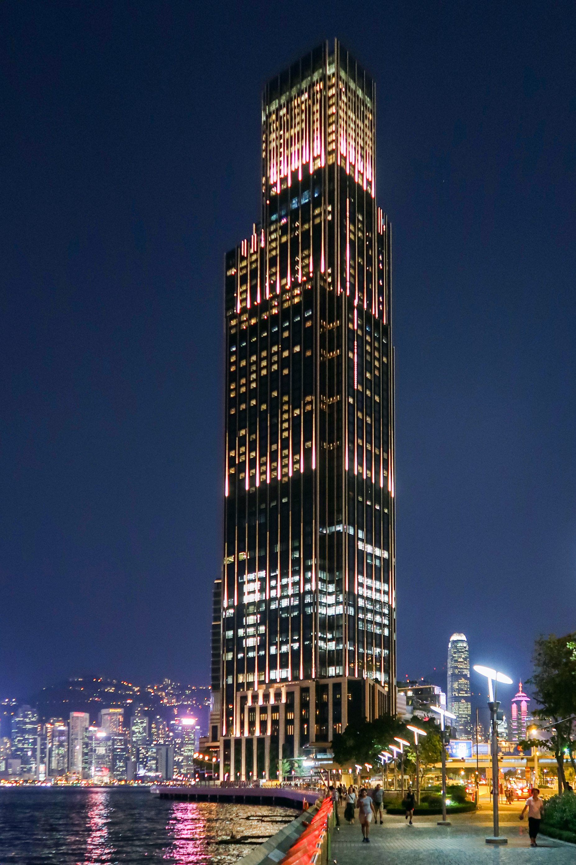 Rosewood Hong Kong